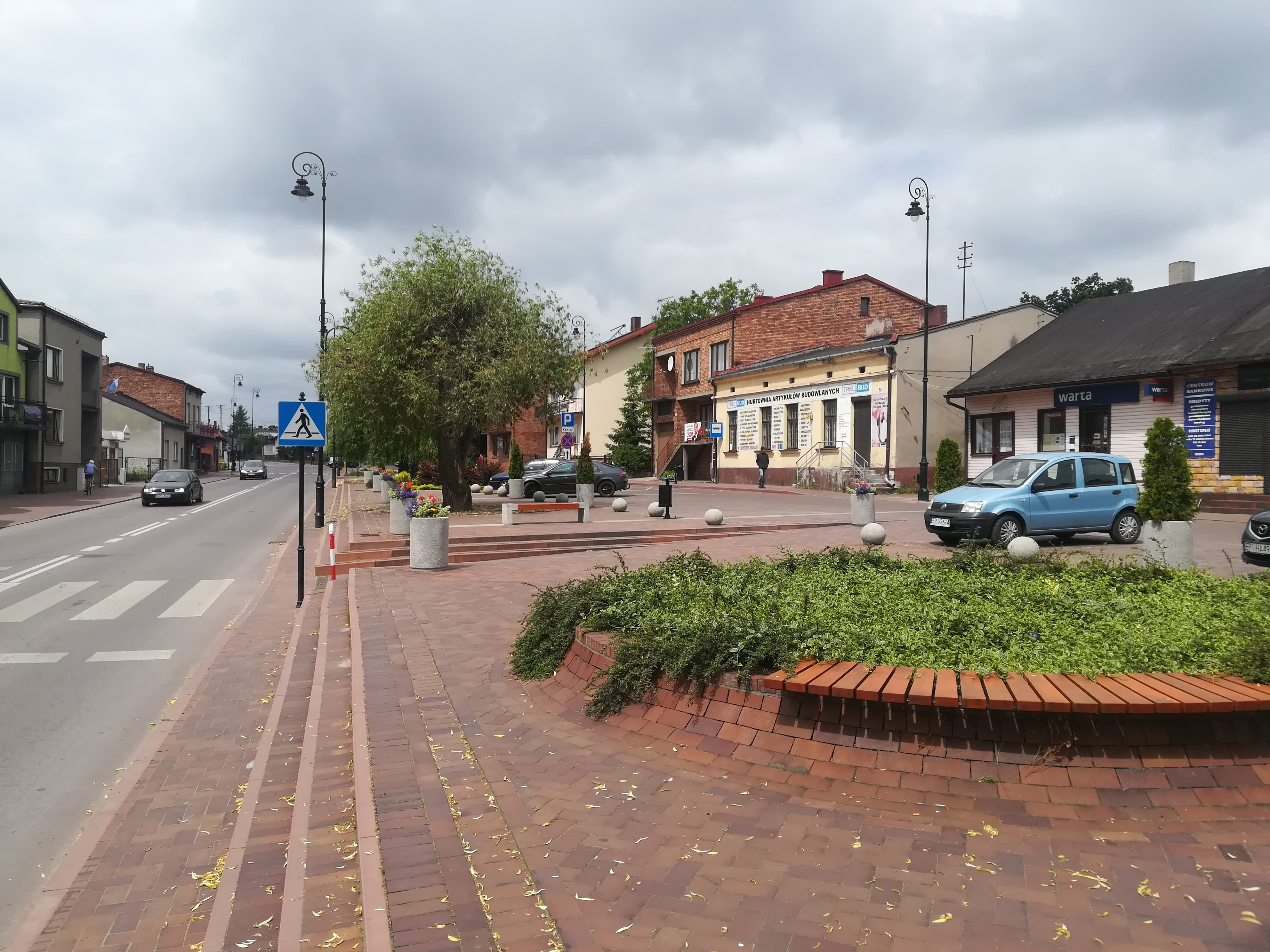 Rynek w Gorzkowicach.